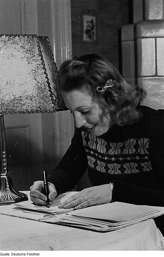 Original image description from the Deutsche FotothekPortrait einer jungen Frau beim Schreiben